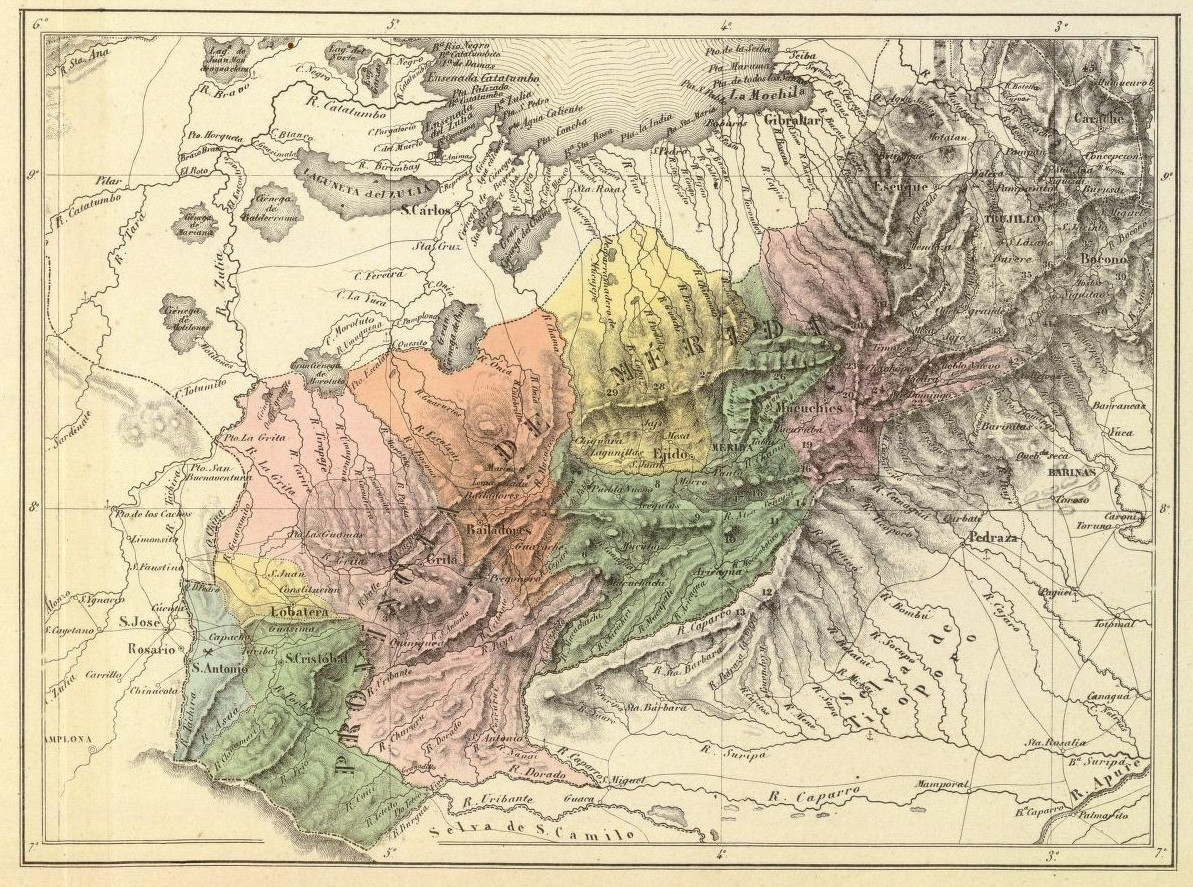 Provincia de Mérida. Tomado del "Atlas físico y político de la República de Venezuela", 1840.